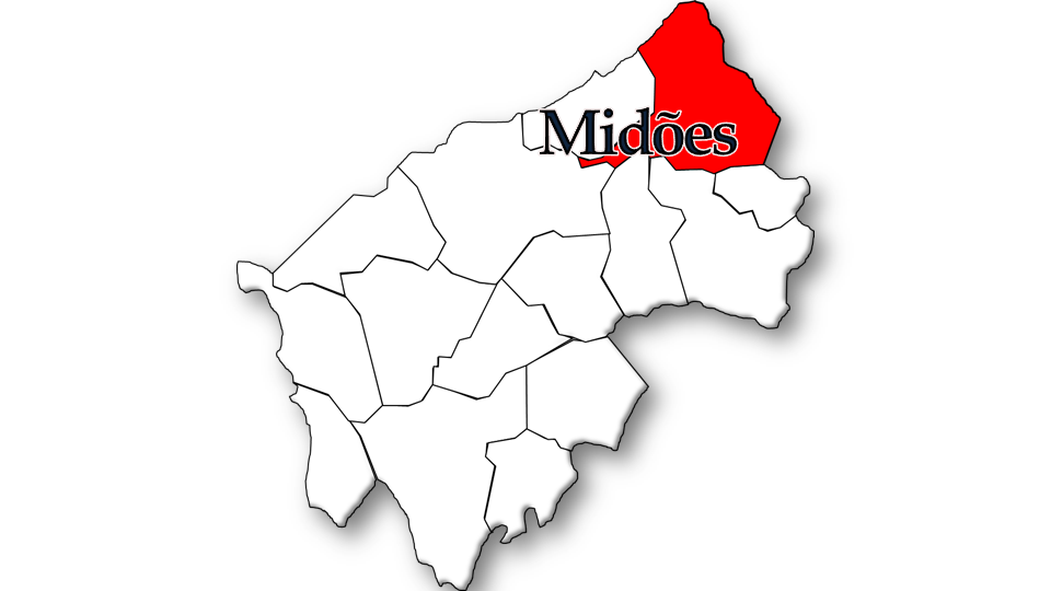 População